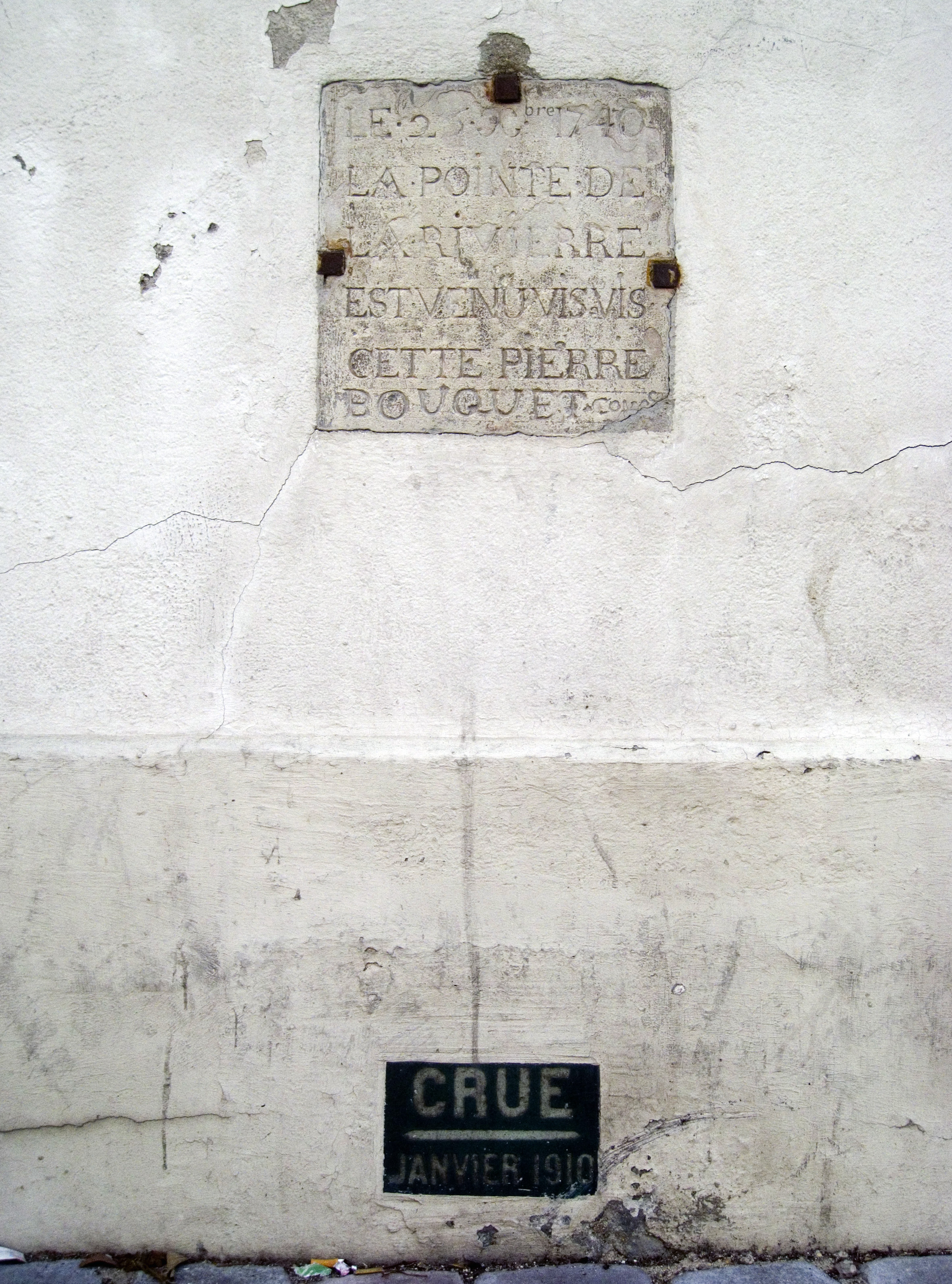 Hôpital des Quinze-Vingts dans le 12e à Paris, témoin de la crue de 1740 et de celle de 1910.